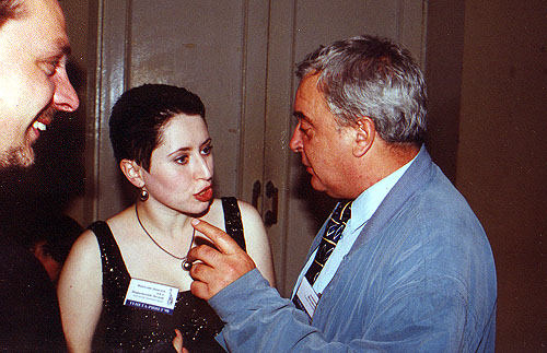 Евгений Горный, Линор Горалик, Александр Житинский. Награждение лауреатов сетевого литературного конкурса "ТЕНЁТА-Ринет'98"